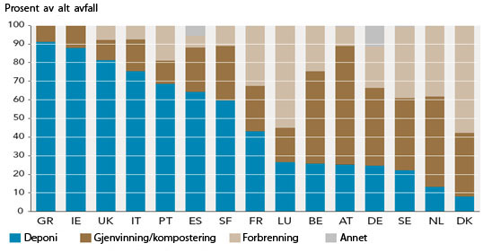 Håndteringsmetode for avfall i noen utvalgte land